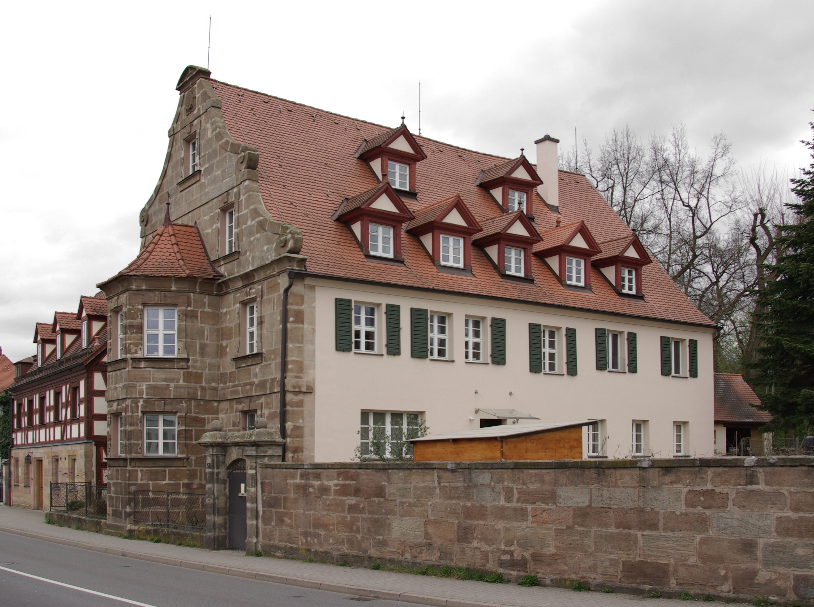 Ehemaliges Gasthaus Zum Goldenen Bären (Kern im 16./17. Jahrhundert, Fassade im Jahr 1728 erbaut) in der Fürther Straße 53 (früher Haus Nr. 24) im Erlanger Stadtteil Bruck. Das Gebäude wird irrtümlich auch Keltschenschloss genannt.